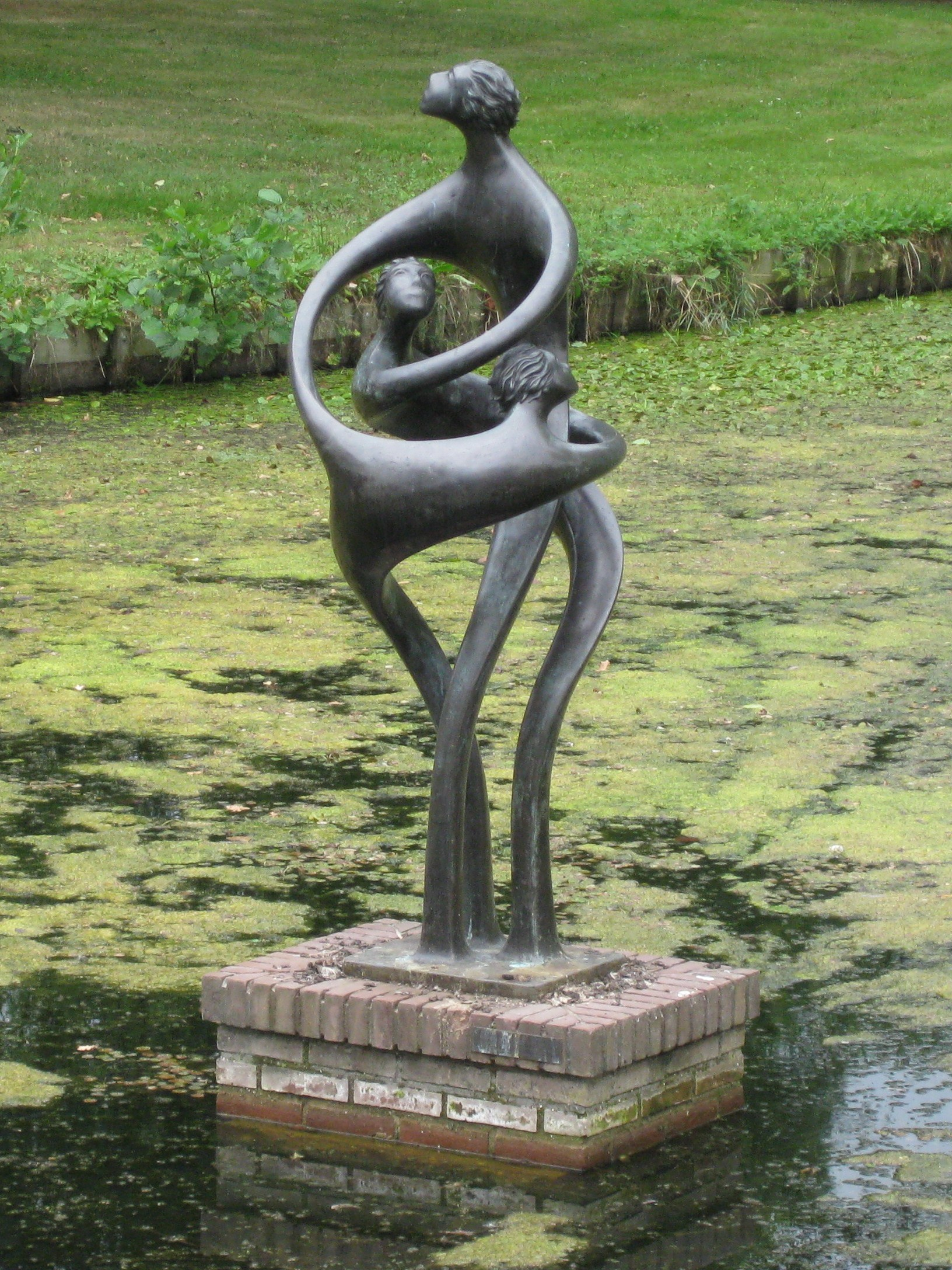 "Samenwerking", sculptuur van drie in elkaar verstrangelde figuren in Eemnes. 1998 brons kunstenaar Kees Huigen